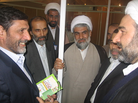 وزیر اسبق ارشاد در حال بازدید از کتاب خدا شناسی قرآنی کودکان